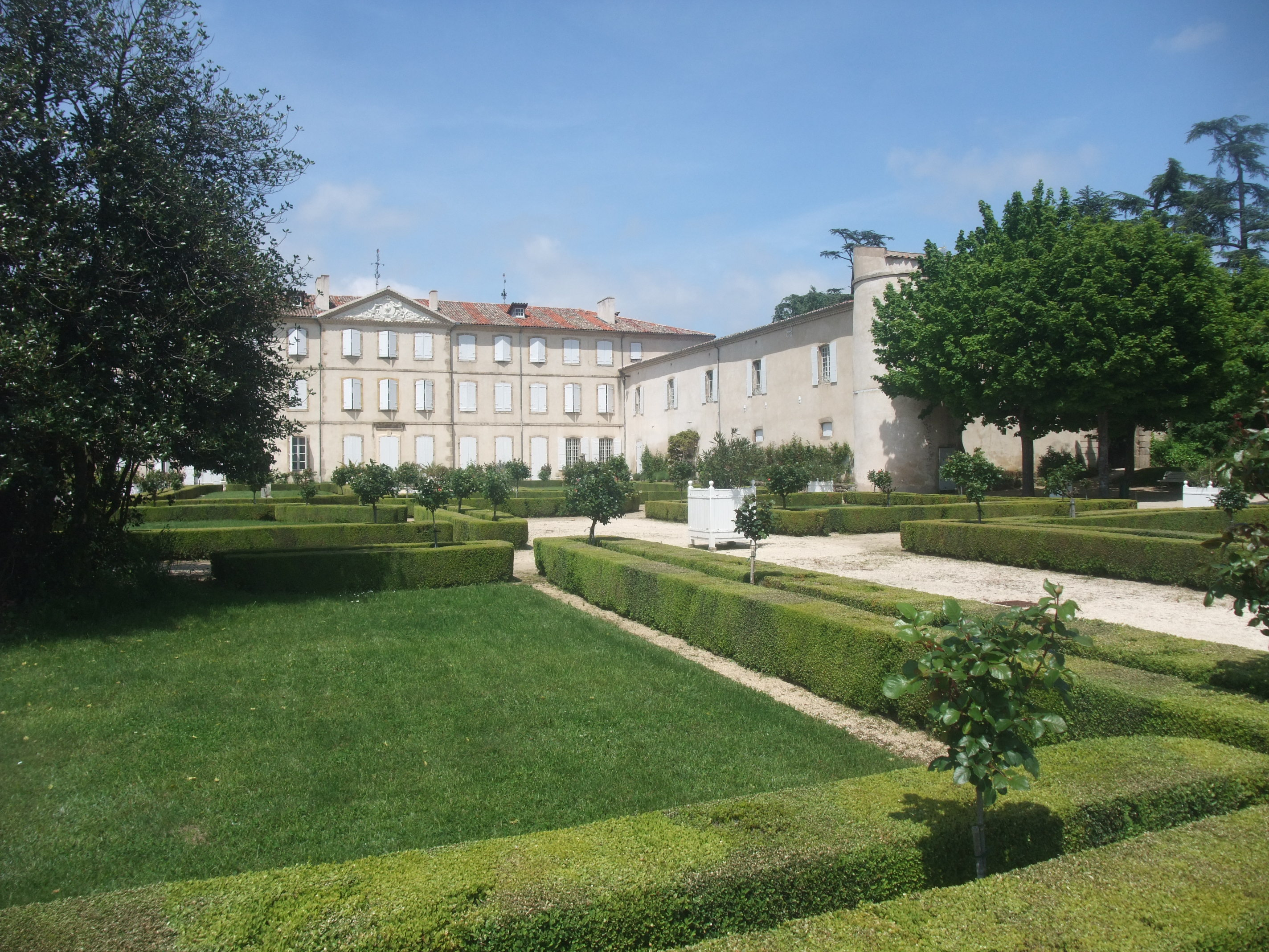 Saint-Clair (Ardèche) Gourdan face